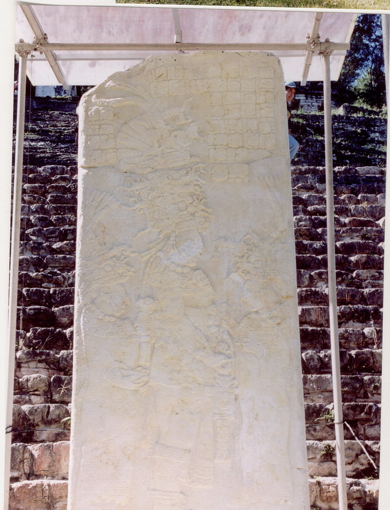 Bonampak - Stele n.2 gennaio 2002 Scansione da foto propria